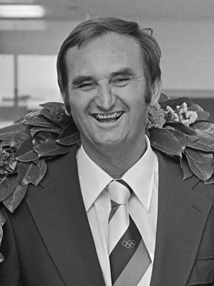 Deel waterpoloploeg terug uit Montreal, v.l.n.r.: Buunk, trainer Trumbic, Smits en reservekeeper Boegschoten in de bloemen 30 juli 1976